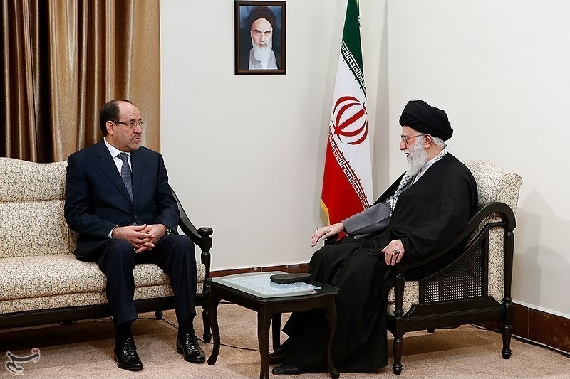 لقاء رئيس الوزراء العراقي السابق بقائد الثوره الاسلامية